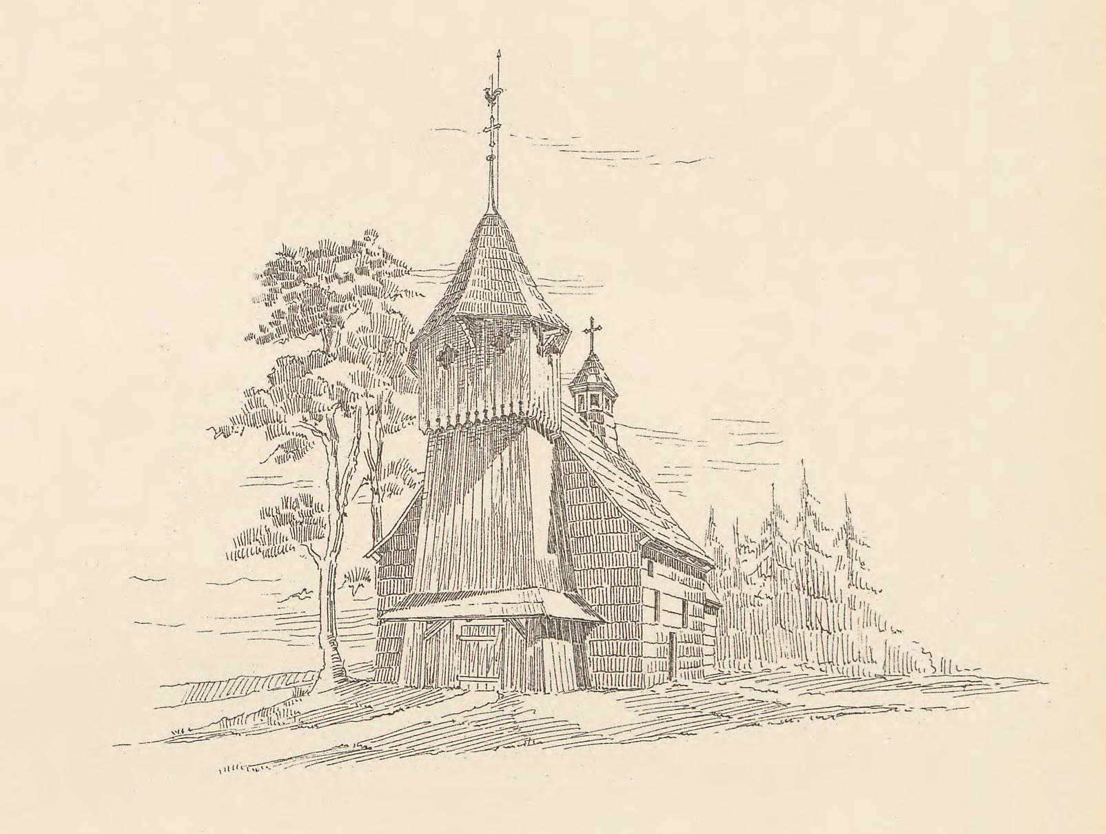 Stare Olesno - kościół parafialny p.w. św. Marii Magdaleny, drewn., 1680